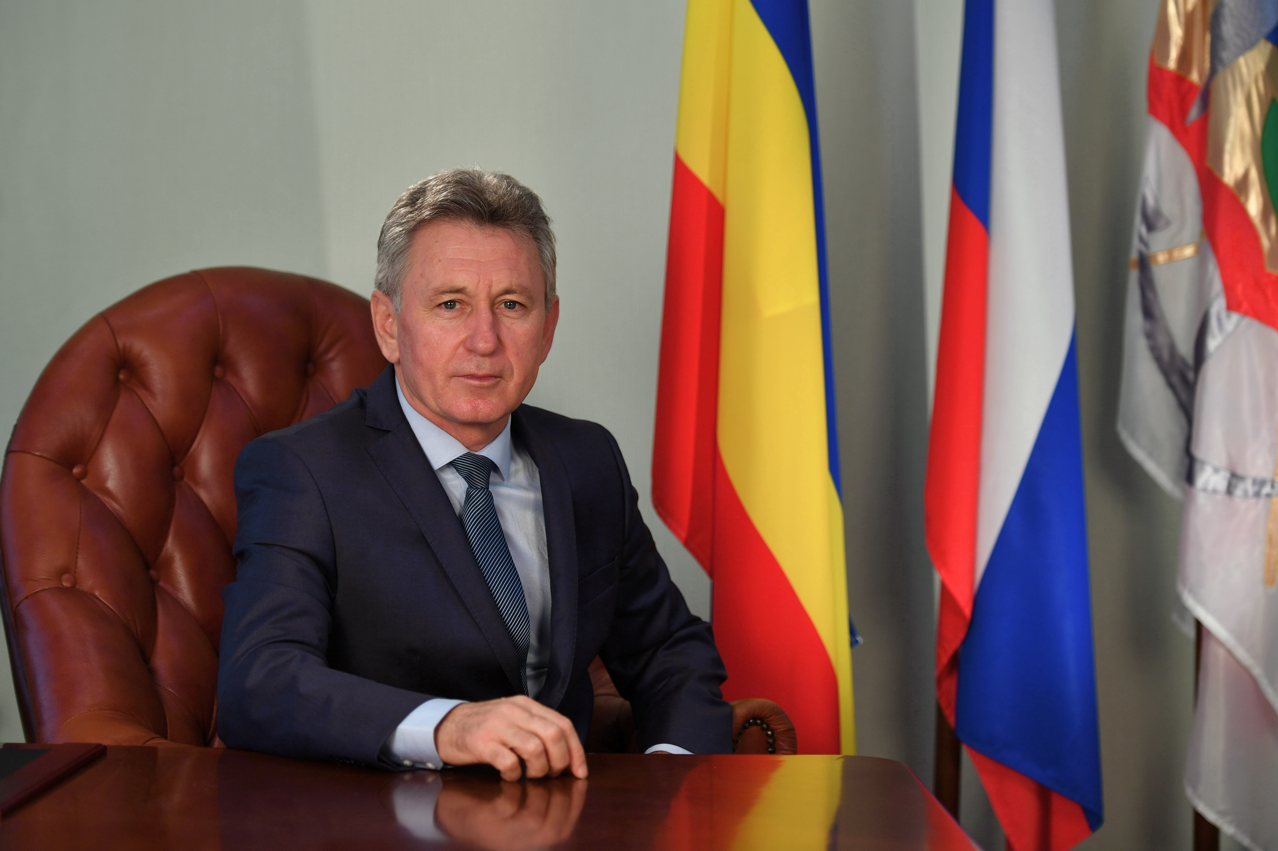 Виктор Павлович Мельников — глава Администрации города Волгодонска.